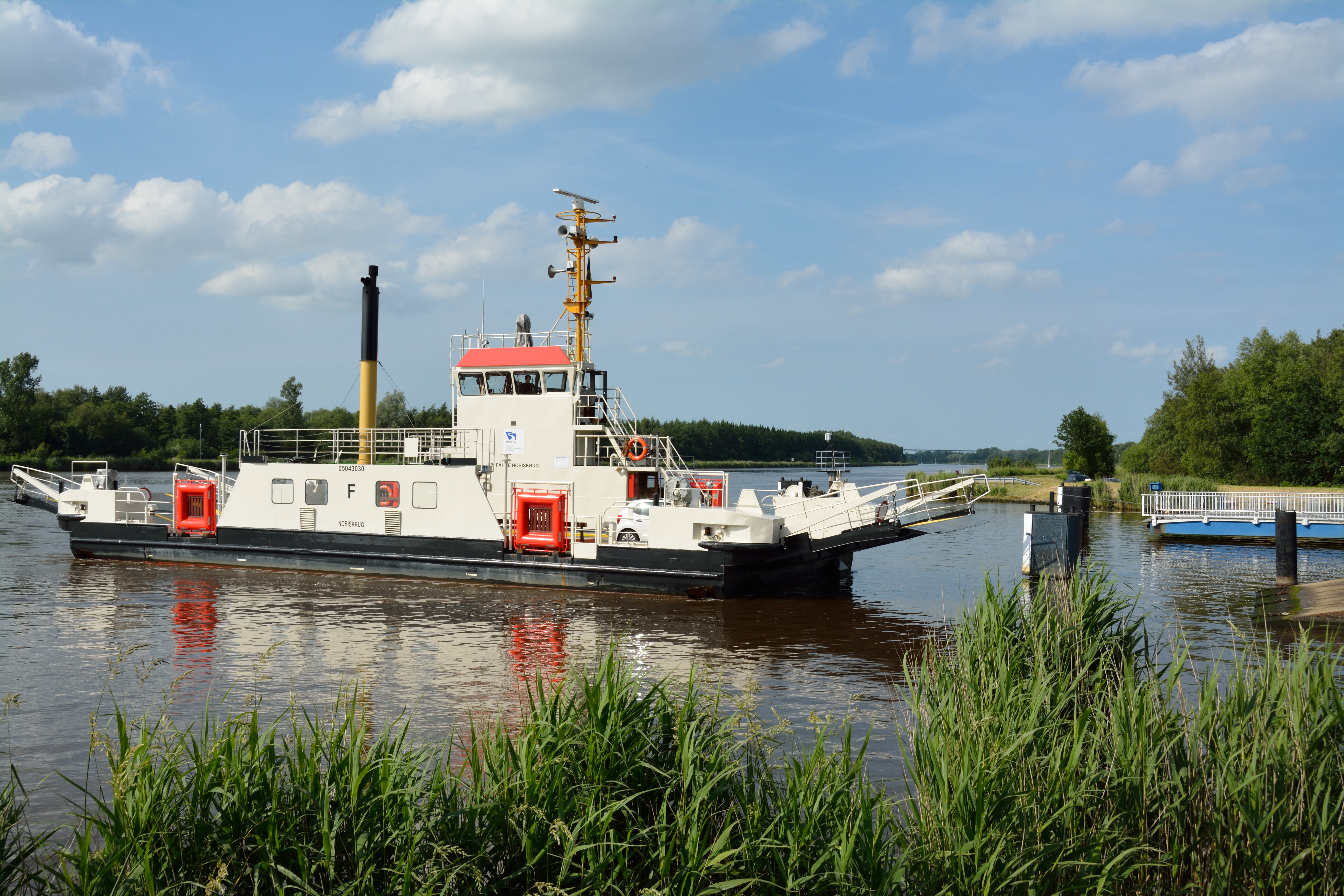 Burg (Dithmarschen), die Fähre "Nobiskrug" über den Nord-Ostsee-Kanal